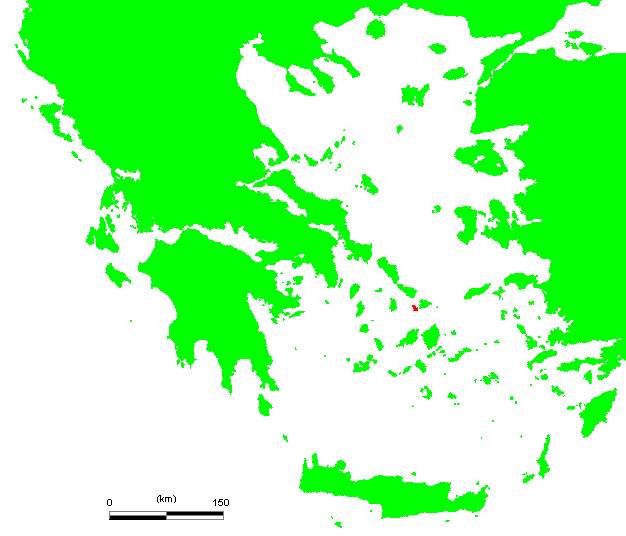 GR Delos.PNG (Greek island)